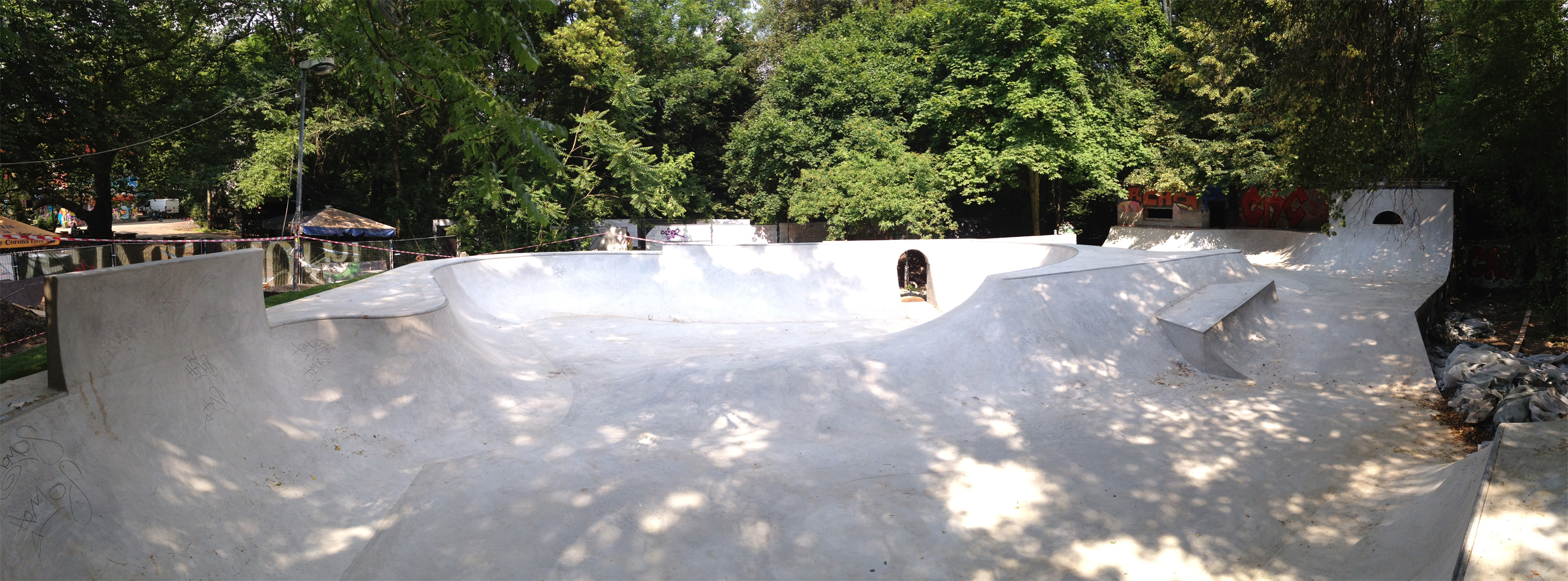 Neuer Conne Island Skatepark in Leipzig im Jahr 2013